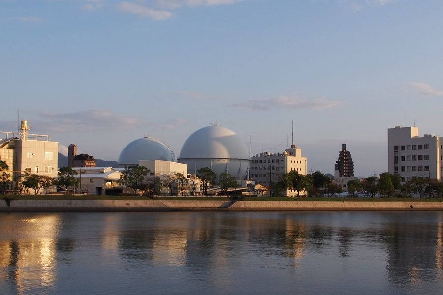 広島県広島市南区皆実町 広島ガス ガスタンク（対岸から撮影）